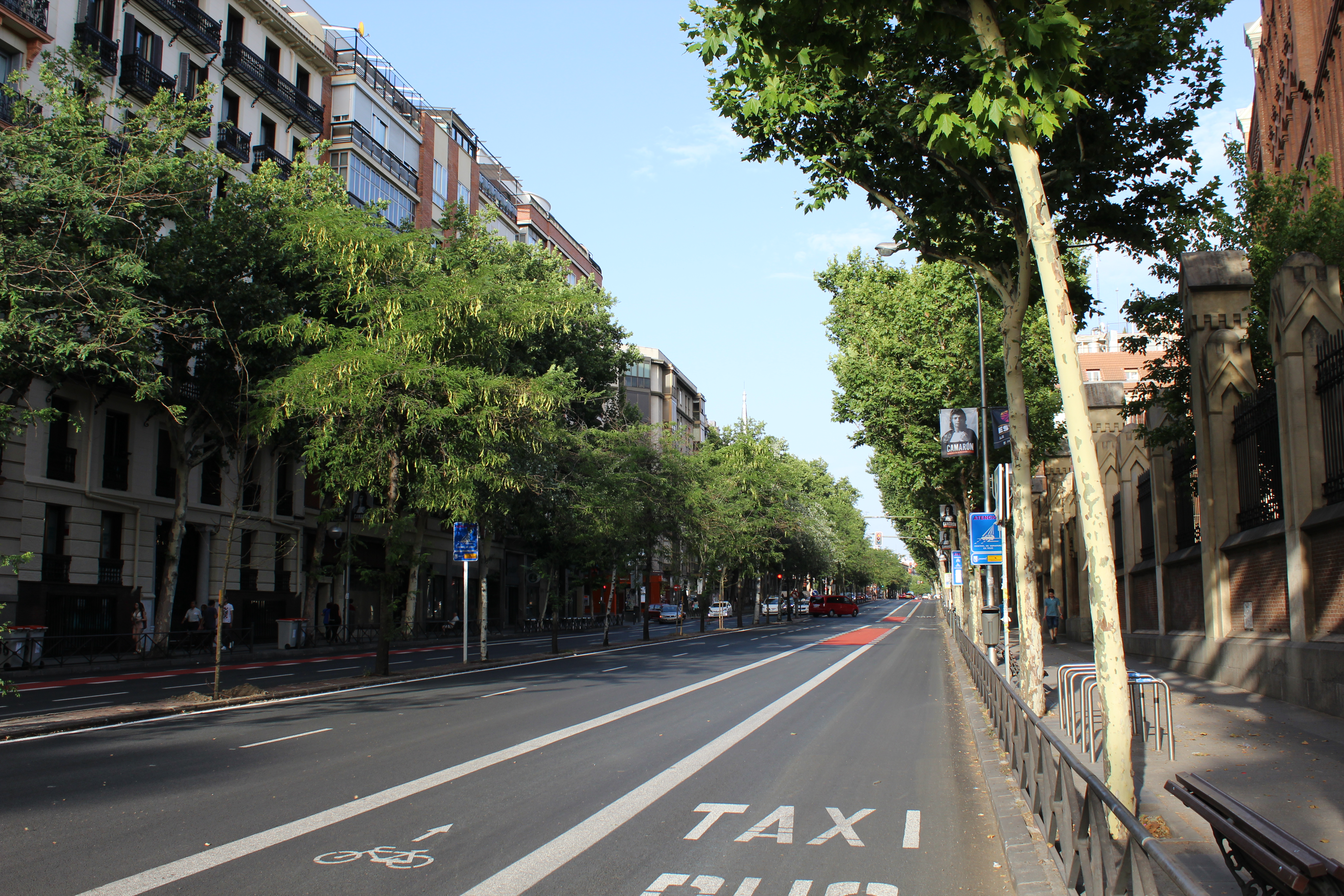 Calle de Alberto Aguilera, Madrid.